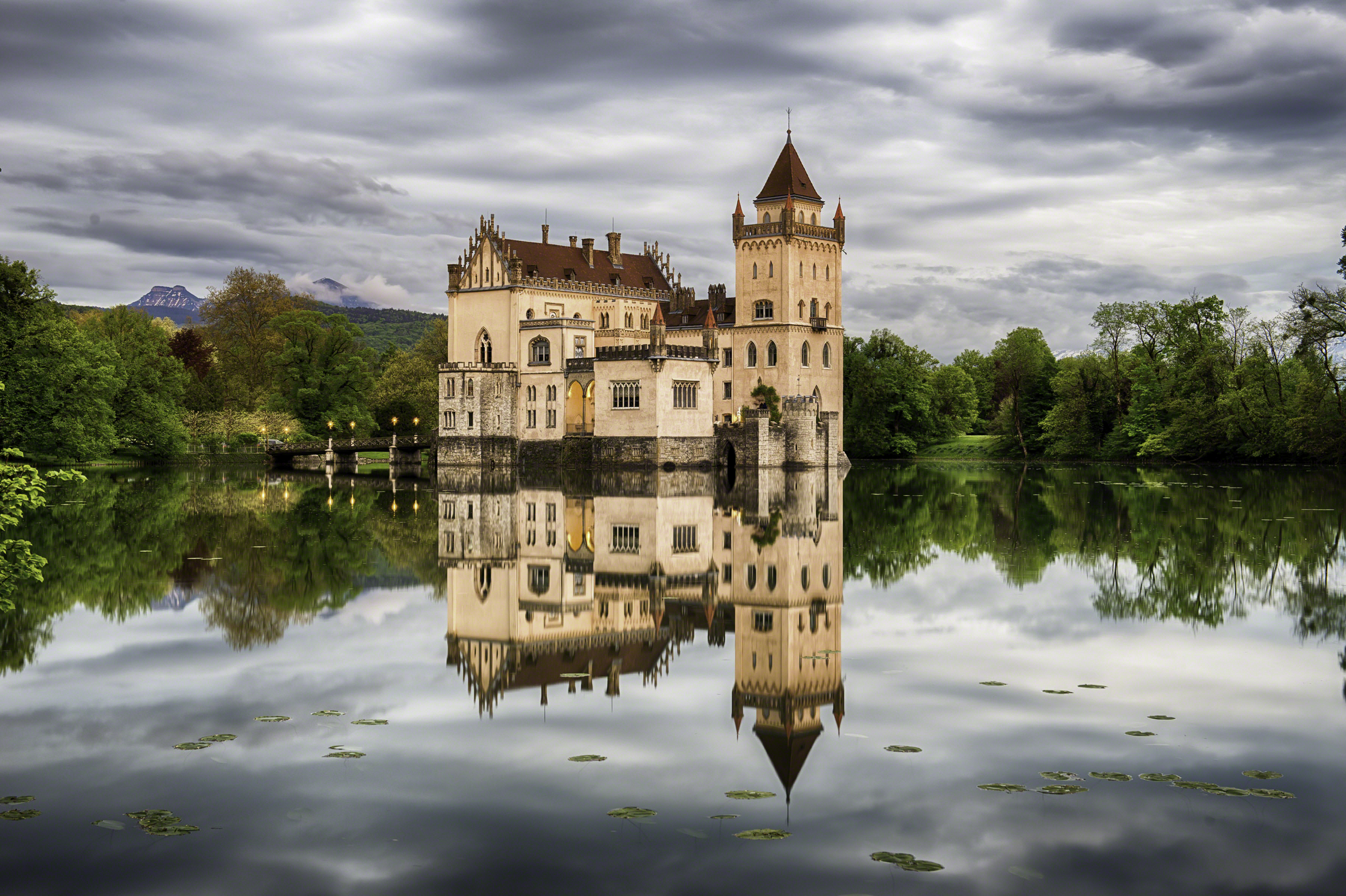 Schloss mit Einrichtung und Park This media shows the Geschützter Landschaftsteil in Salzburg with the ID GLT00001.